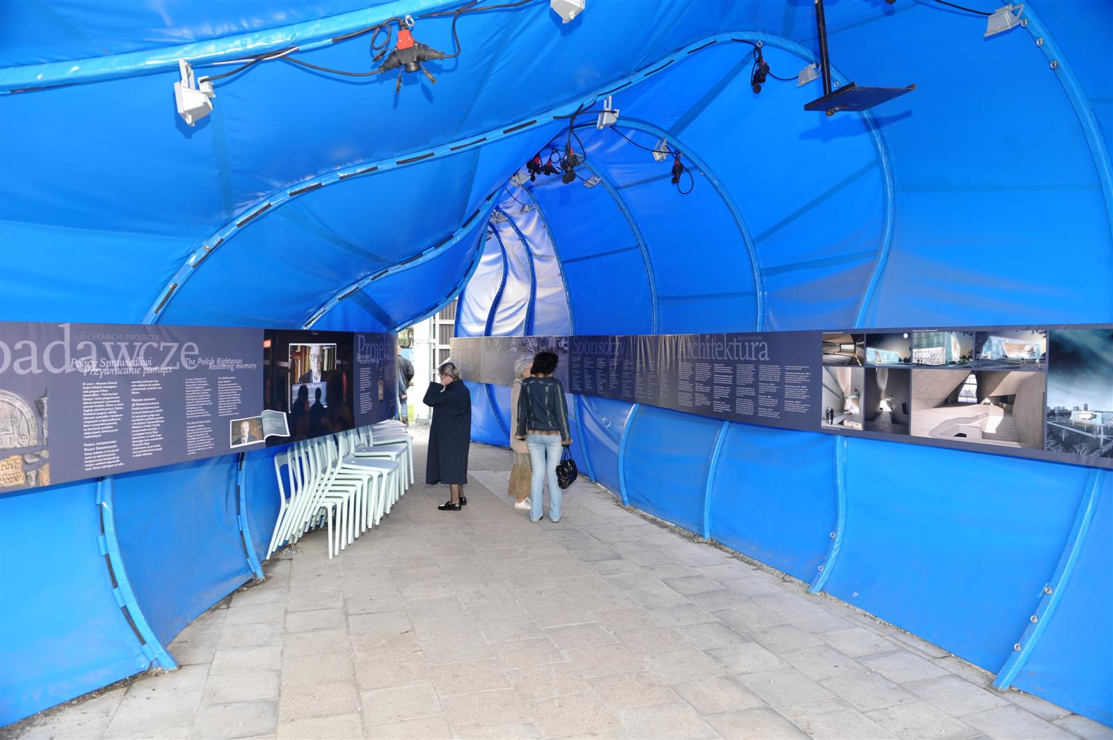 OHEL (namiot) - czasowa instalacja artystyczna, zapowiada Muzeum Historii Żydów Polskich